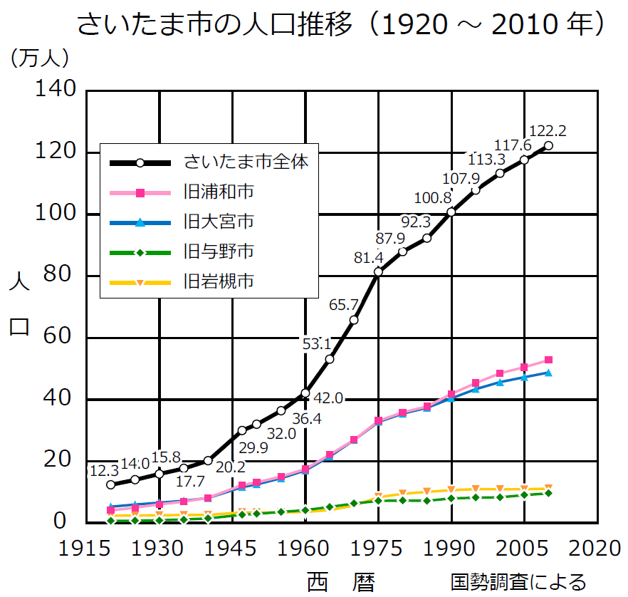 現さいたま市域における人口の推移（1920年～2010年）。 出典は国勢調査による。 市町村合併による影響は可能な限り排しているが、旧市町村がさいたま市と他の市町村とにまたがる地域については、以下の対応をとっている。 旧大門村 …一部が川口市、残りが旧浦和市に含まれる。1955年以前の「旧浦和市」には、旧大門村全体の人口を含む。 旧美谷本村 …戸田市と旧浦和市とにまたがる。1955年以前の「旧浦和市」には、旧美谷本村の人口は含まない。 旧河合村 …一部が蓮田市、残りが旧岩槻市に含まれる。1950年以前の「旧岩槻市」には、旧河合村全体の人口を含む。